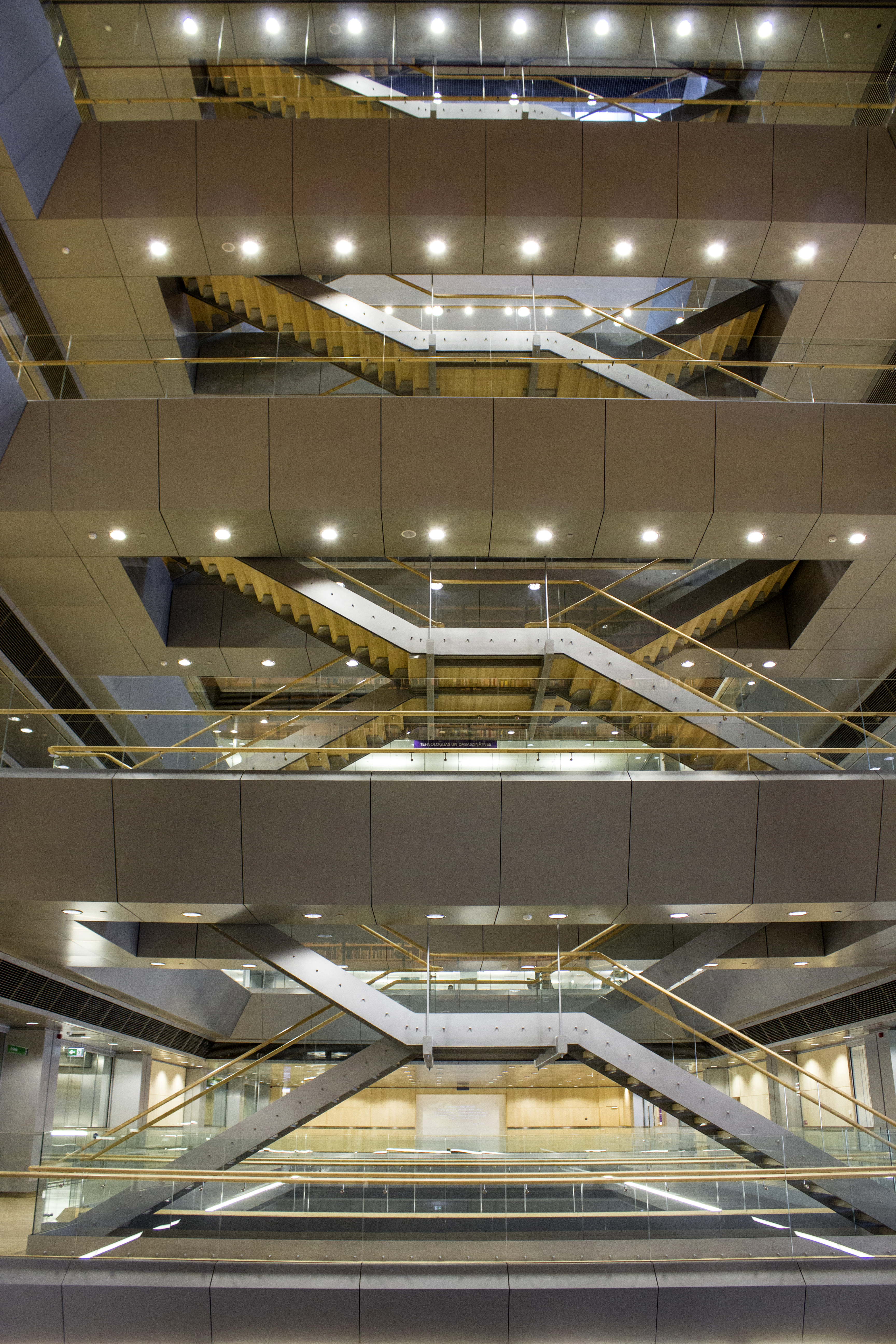 Latvijas Nacionālā bibliotēka / National Library of Latvia